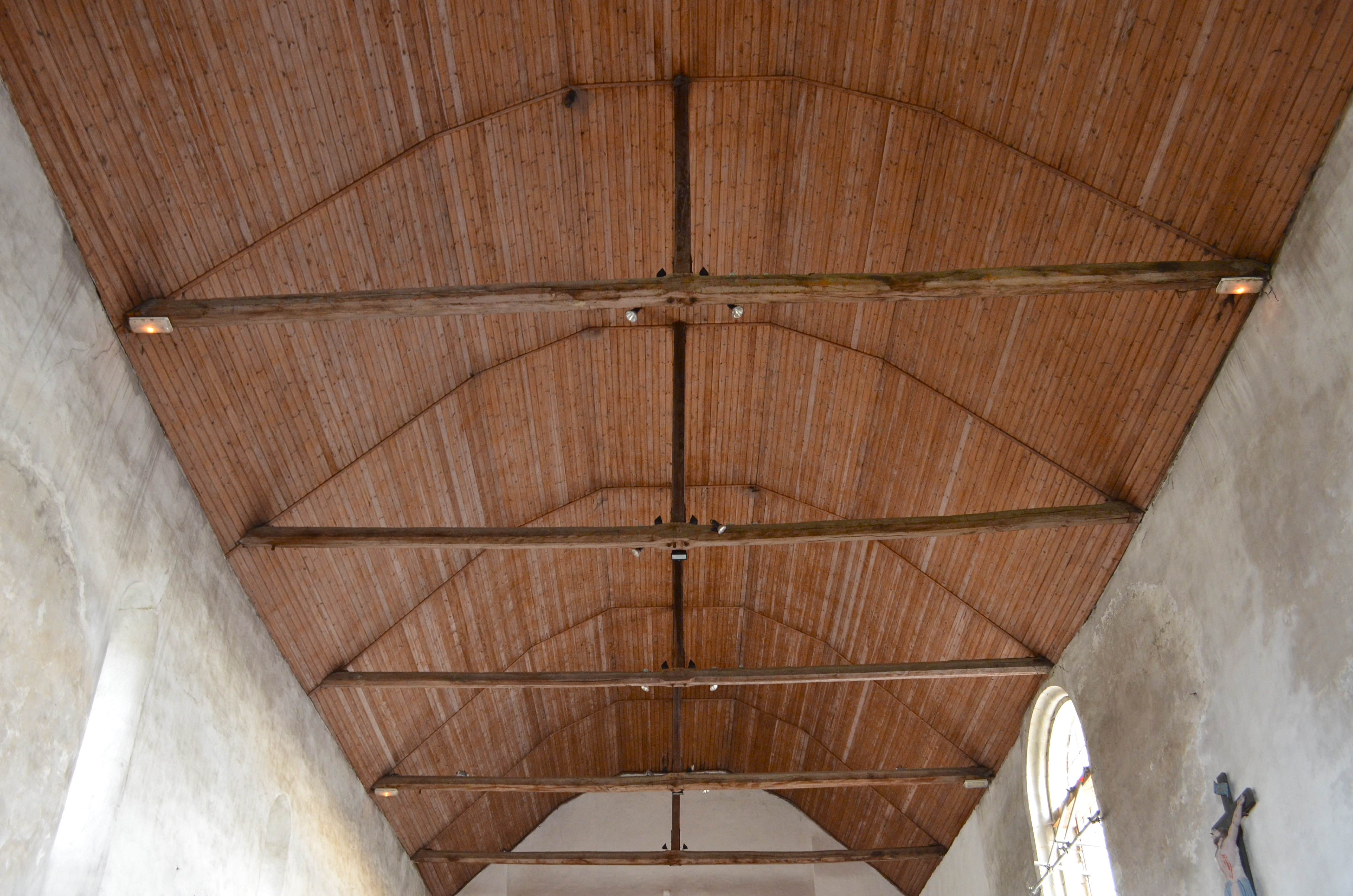 Eglise Saint-Jean de Béré - Châteaubriant (Loire-Atlantique)